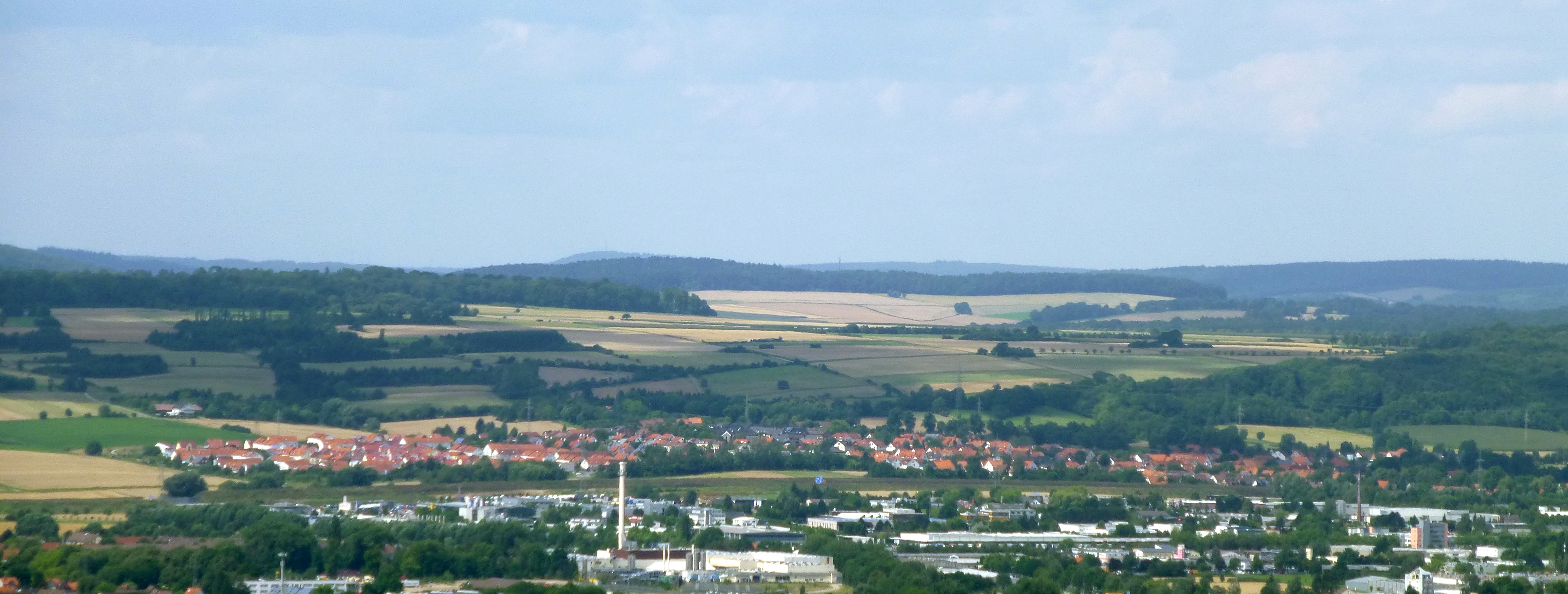 Blick vom Bismarckturm (con Osten) über das Göttinger Industiriegebiet auf Elliehausen und den Westhang des Leinegrabens